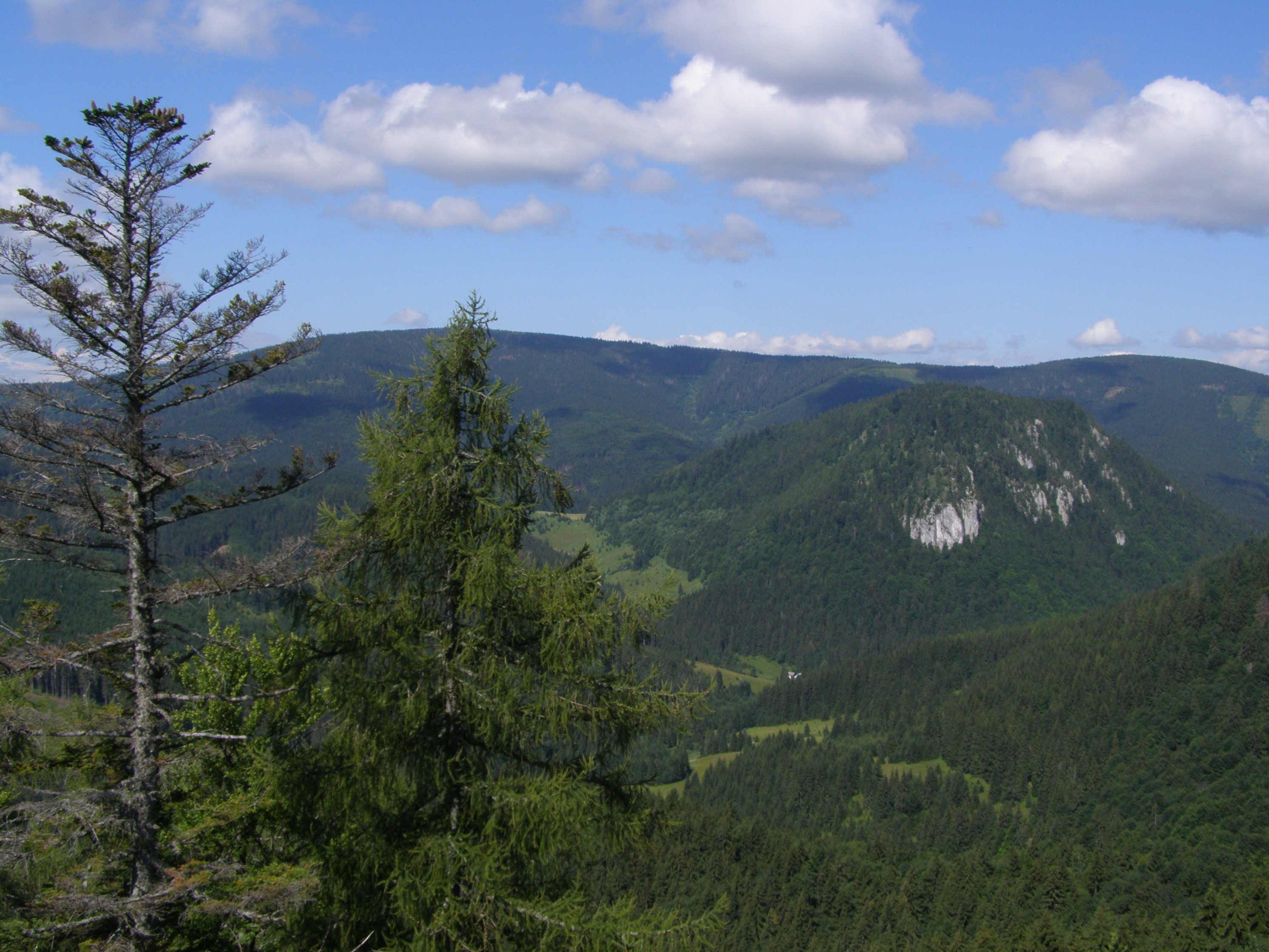 Slovenské rudohoří, Spišsko-gemerský kras, Muráňská planina, pohled z vrcholu Skalná brána (1120 m) na severozápad, v popředí vrchol Malá Stožka (1204 m), v pozadí vlevo vrchol Fabova hoľa (1439 m), vpravo Malá Smrekovica (1375 m)